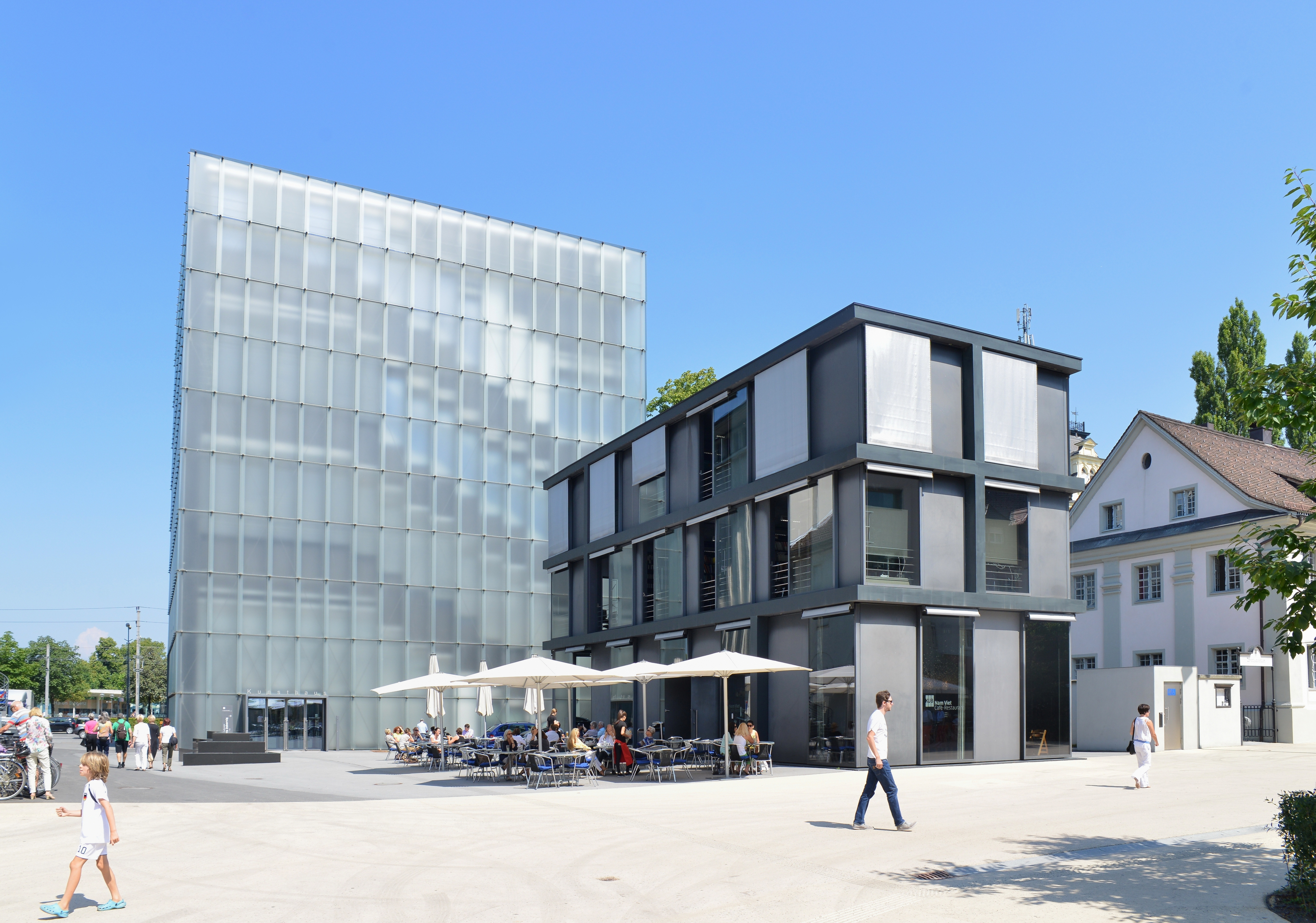 Kornmarktstraße 3 Kunsthaus Bregenz in Bregenz.